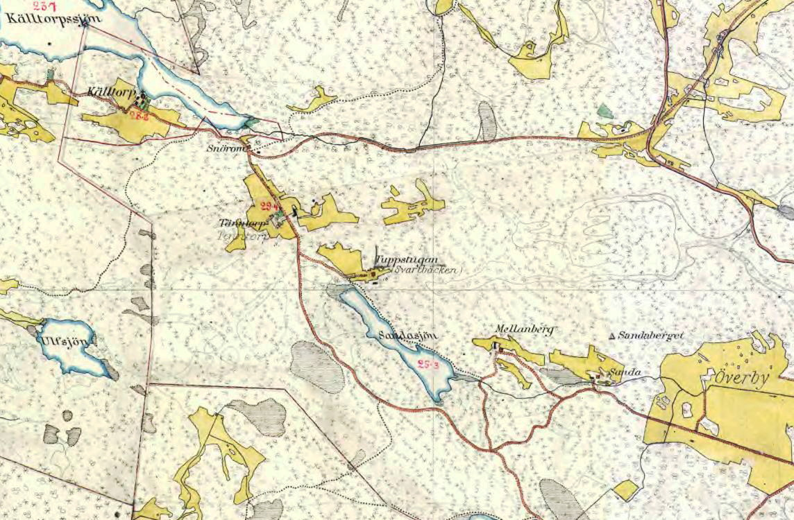 Källtorp, Snörom, Tenntorp, Tuppstugan, Mellanberg, Sanda på Häradsekonomiska kartan